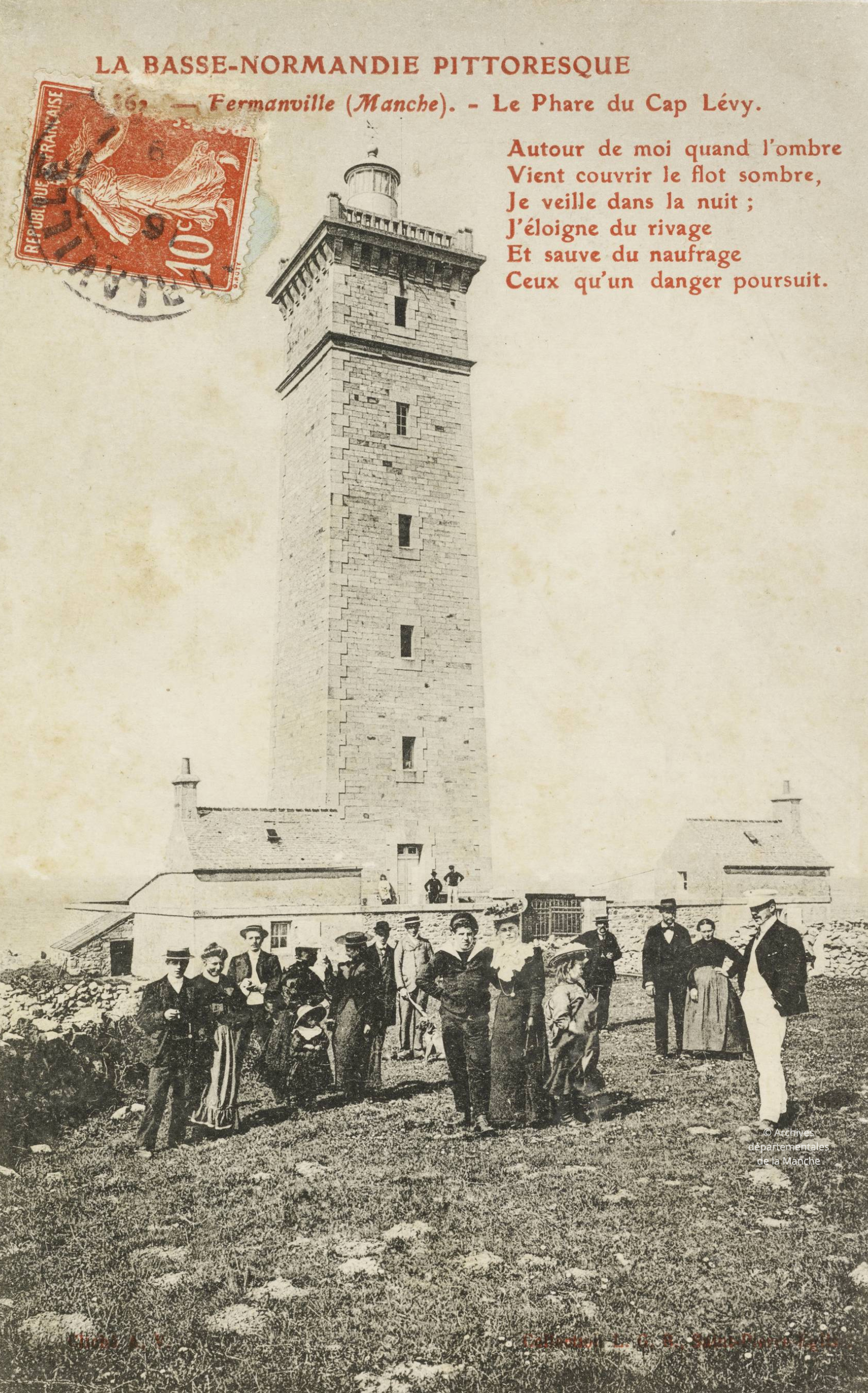 Ancien phare du cap Lévi à Fermanville, Normandie.